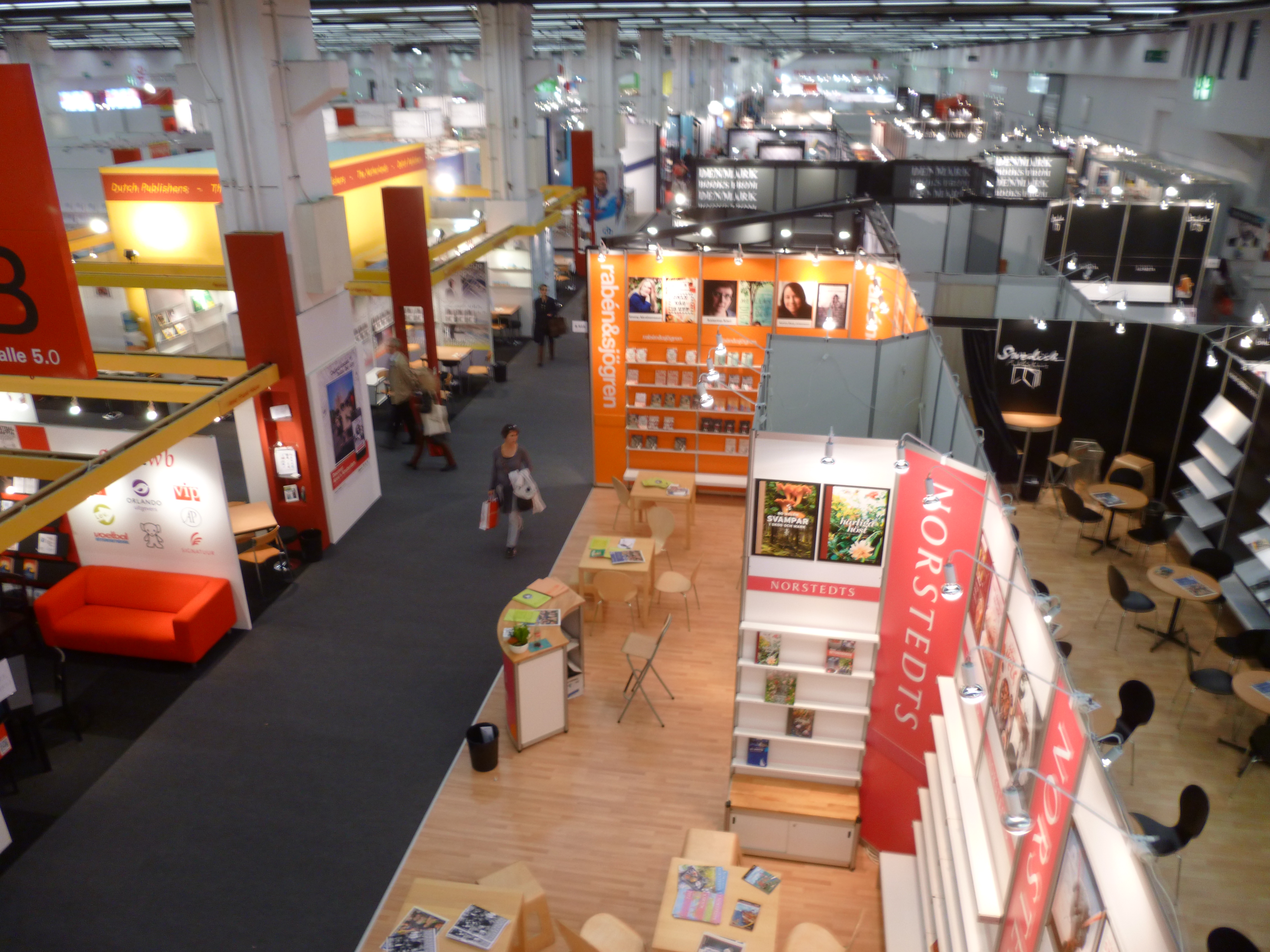 stando de la eldonejo Norstedts en la Frankfurta librofoiro 2012